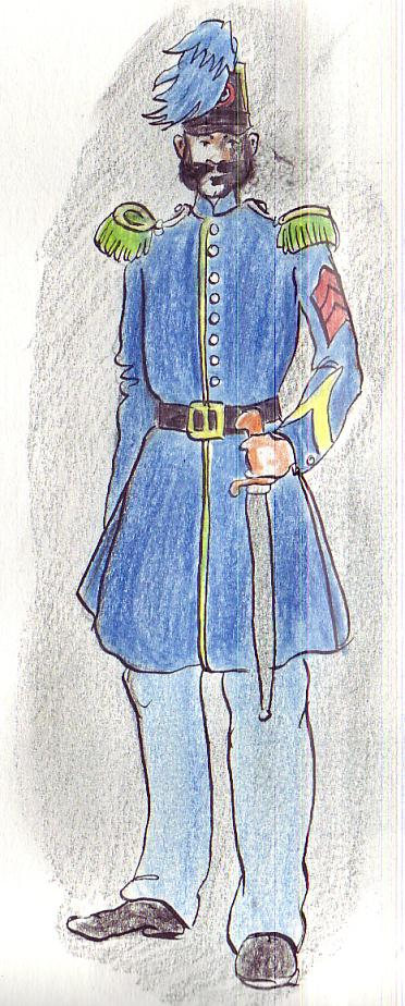 auteur: jean-pierre nègre sujet: chasseur à pied français 1840 dessin d'aprés gravure d'époque